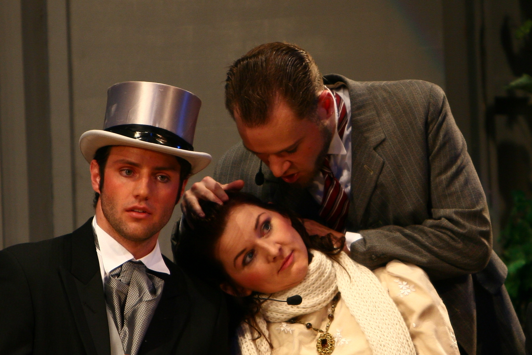 Schauspieler Stefan König zusammen mit Corinna Weiß und Thorsten Wszolek in dem Musical "Mei Fair Lissbeth", Mund Art Theater, Touring Production November/Dezember 2007